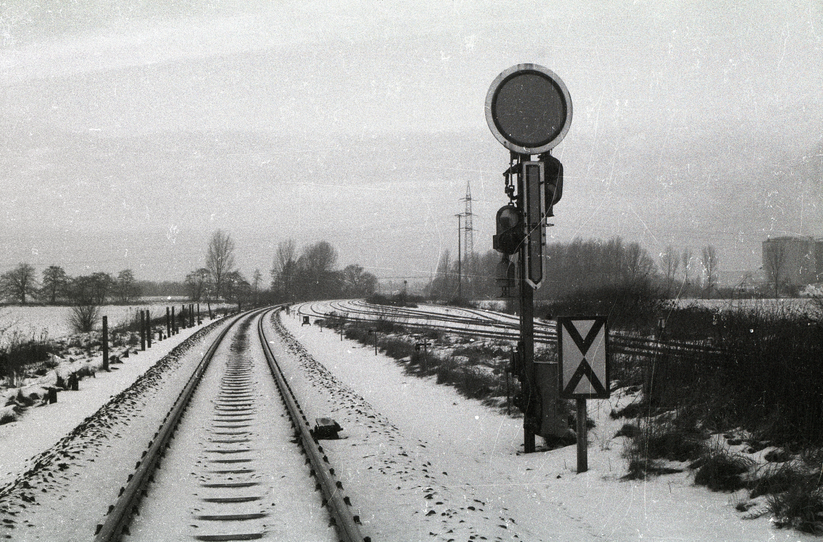 Einfahr-Vorsignal des Bahnhofs Jülich vom Streckengleis aus Richtung Düren aufgenommen, Blick in Richtung Jülich. Rechts das südliche Ende des Vorbahnhofs Jülich. Das Vorsignal wurde Anfang der 1990er Jahre durch ein Lichtsignal an selber Stelle ersetzt; vom Vorbahnhof ist nach dem großen Bahnhofsrückbau der 1980er Jahre nur das durchgehende Gleis übrig geblieben. Hinter dem Fotografen befindet sich die Brücke der Straße Jülich - Düren sowie die Einfahrt zum Gelände des früheren AW Jülich (seit 1964 Bundeswehr-Instandsetzungswerk, heute Mechatronikzentrum genannt).